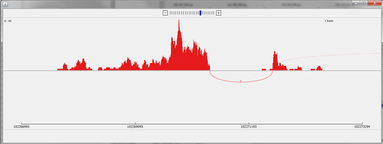 Скриншот работы SashimiPlot, запущенной через IGV.